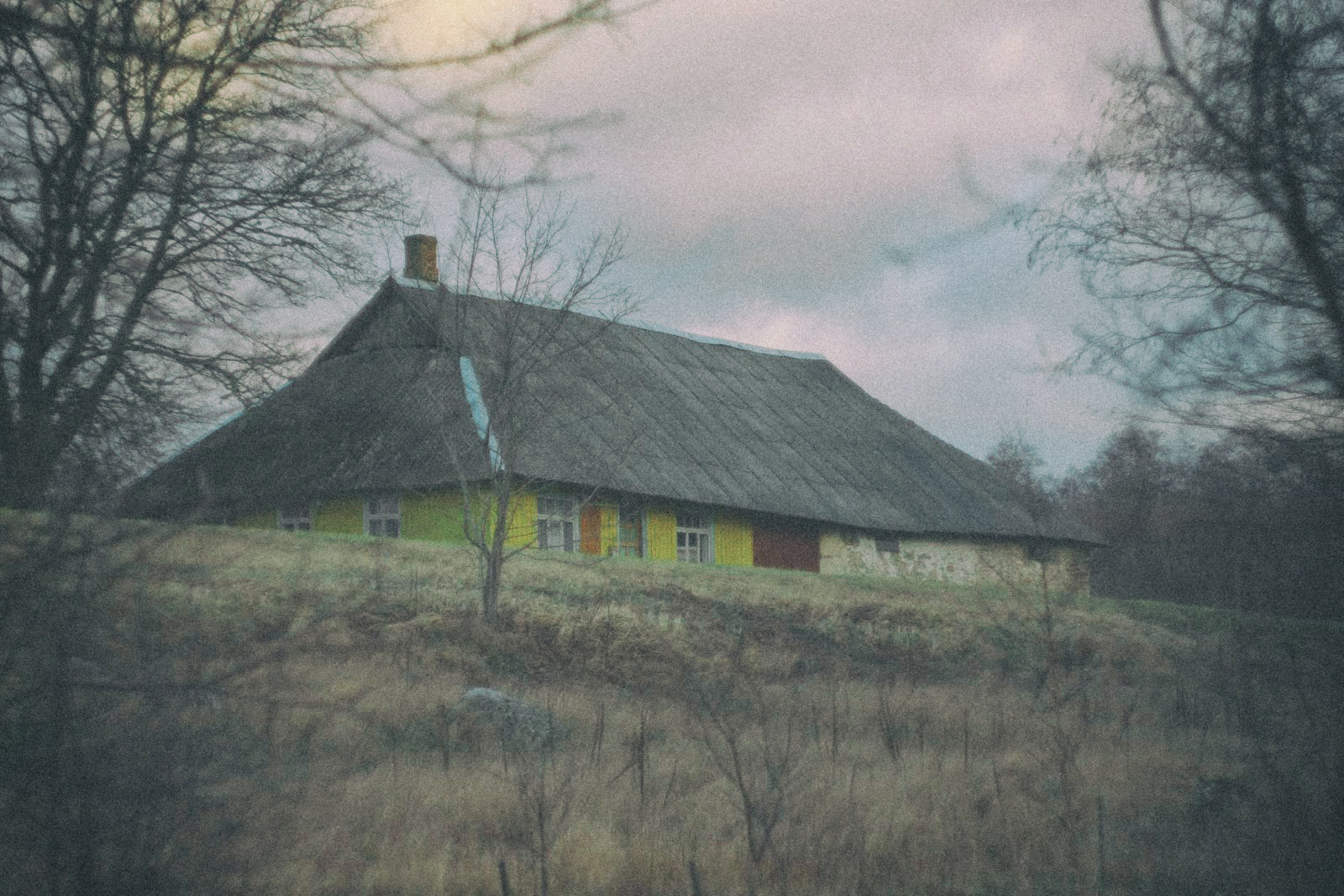 Kõrtsihoone Kangrusseljal Kalmumäel